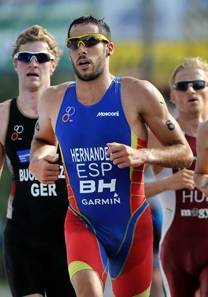 Vicente Hernández